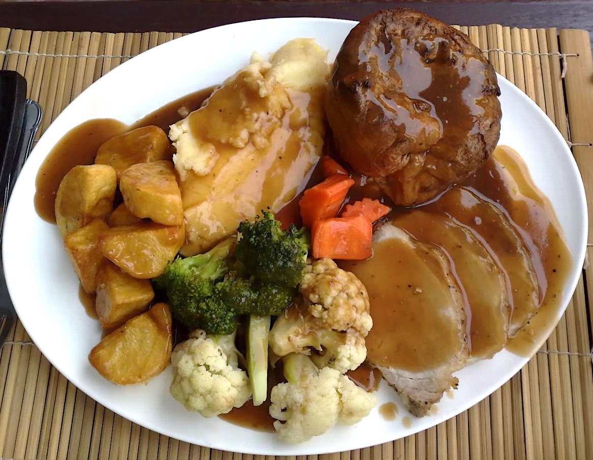 Sunday roast, hier aus Schweinebraten, verschiedenem Gemüse, Röstkartoffeln, Kartoffelpüree, kleinem Yorkshire-Pudding und Sauce.